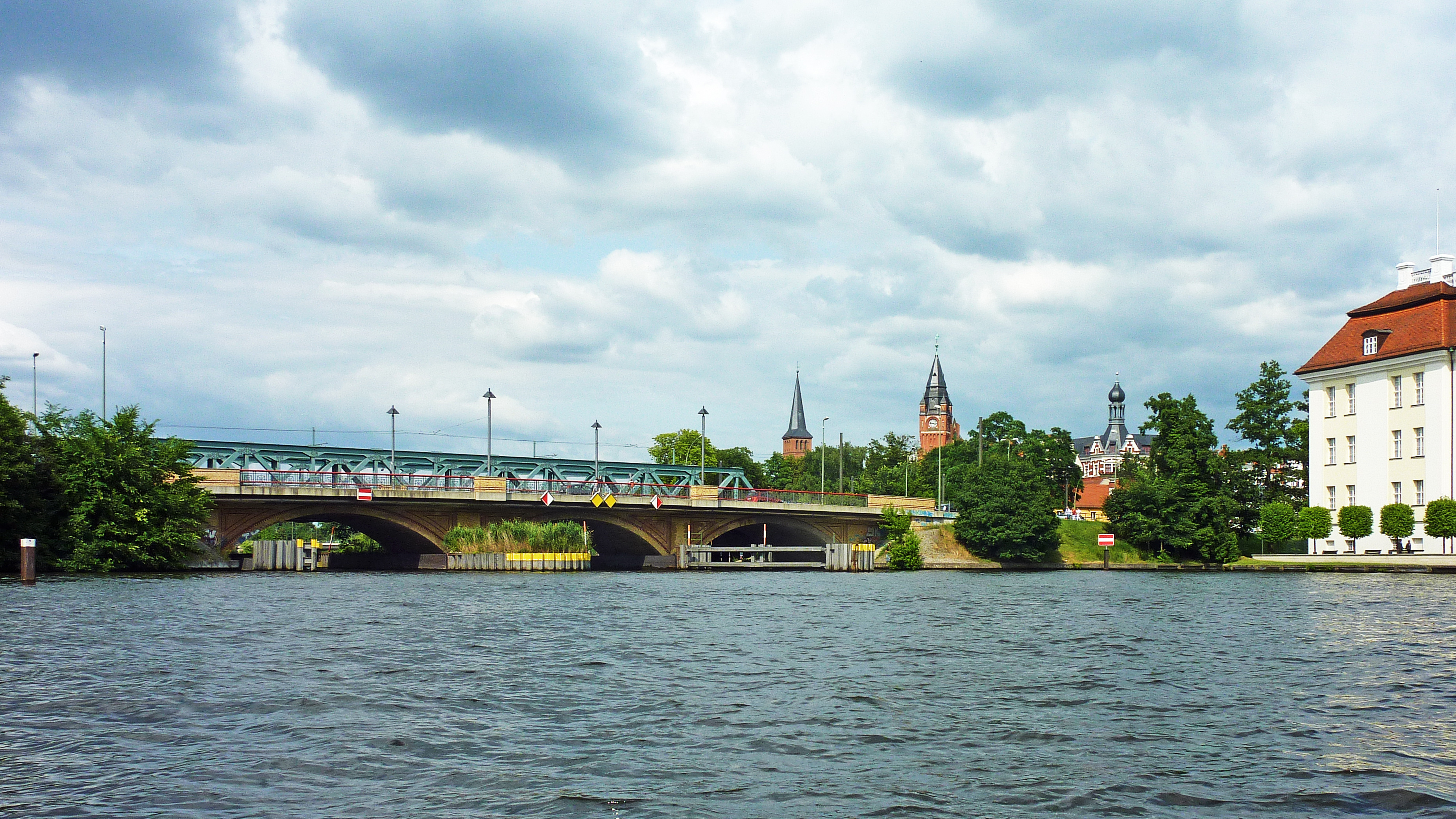 Lange Brücke und Ecke des Schlosses in Berlin-Köpenick. Blick von der Dahme zur Altstadtinsel.